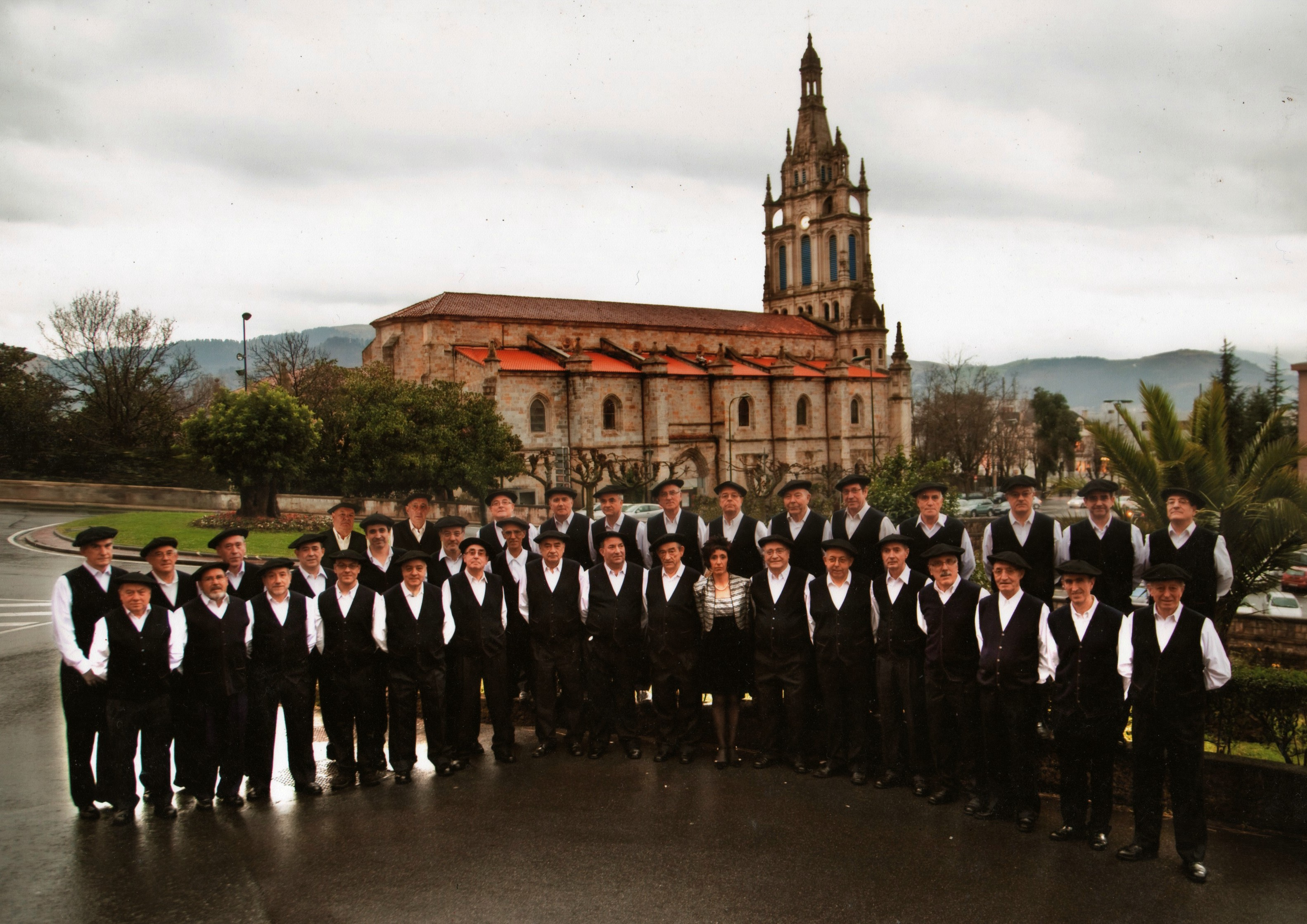 Garaizarko Mahatsorriak abesbatza Begoñako basilikaren inguruan.